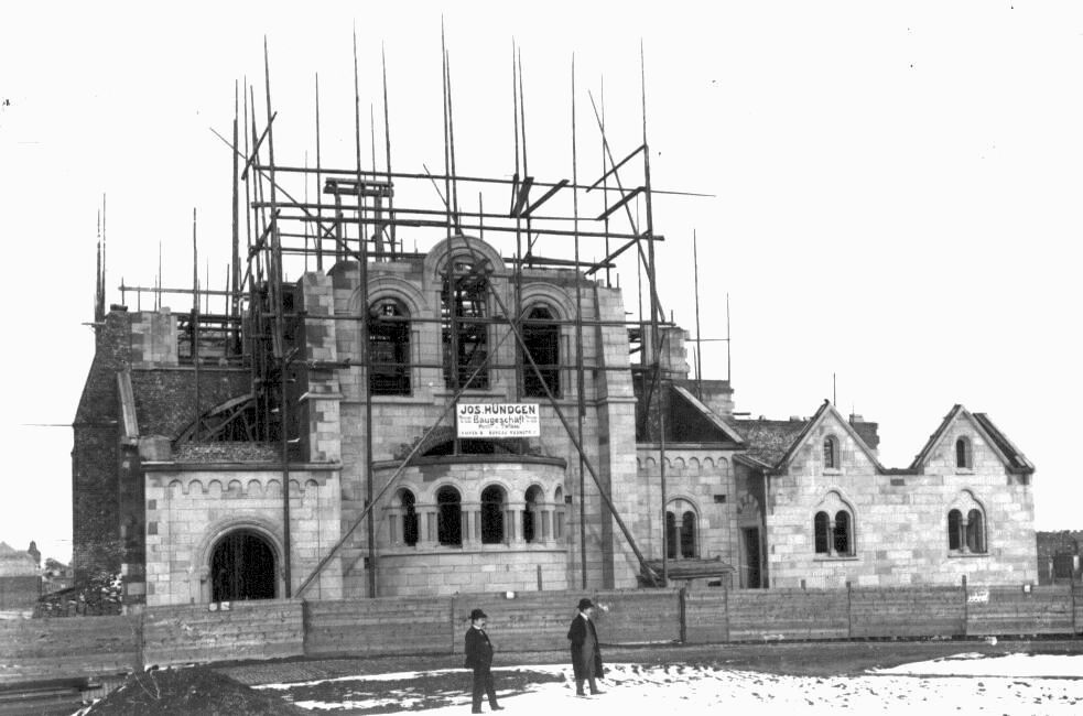 Kirche Herz Jesu in Aachen-Burtscheid, im Bau (1909-1910)